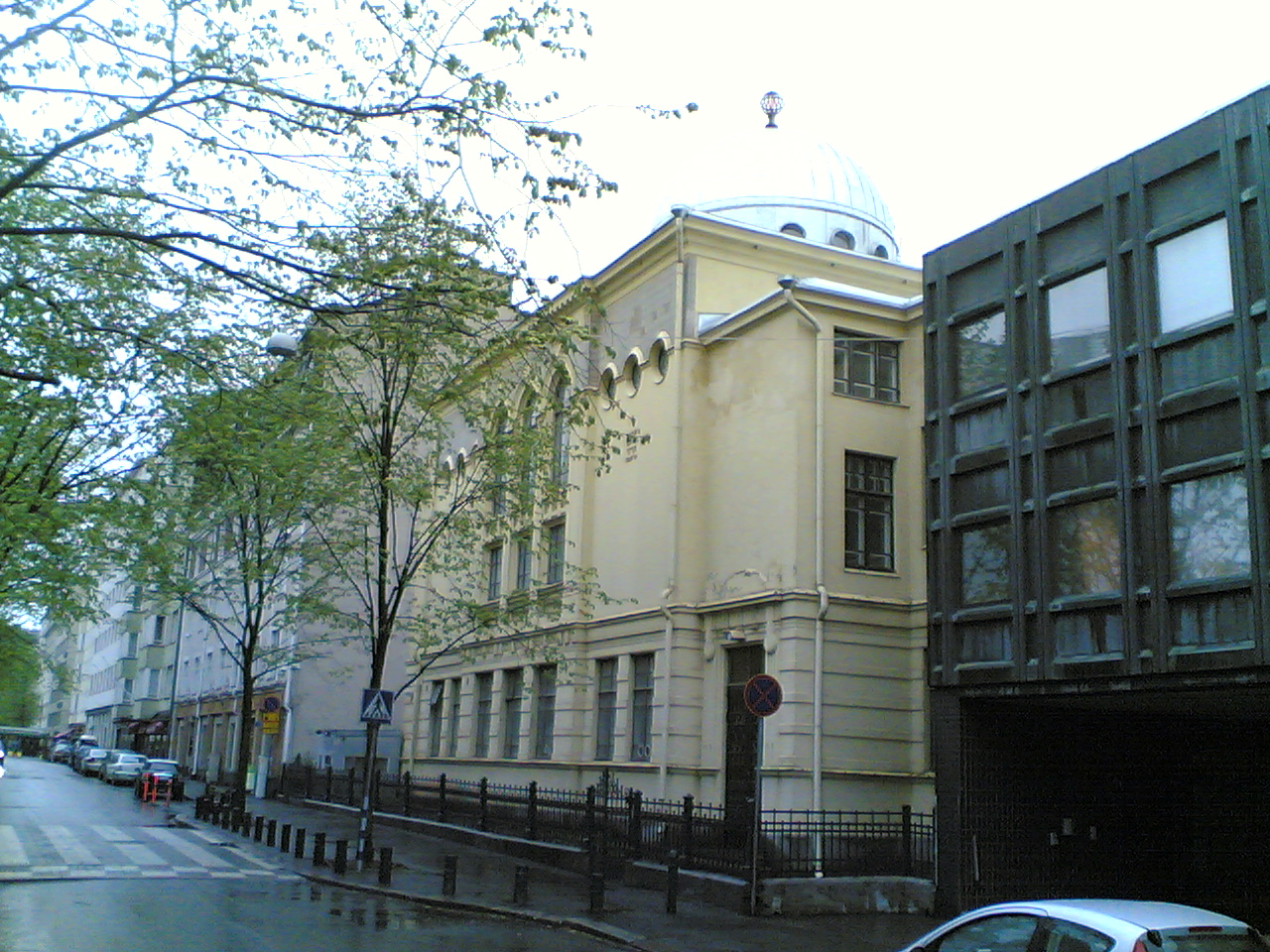 Helsingin Synagoga Malminkatu